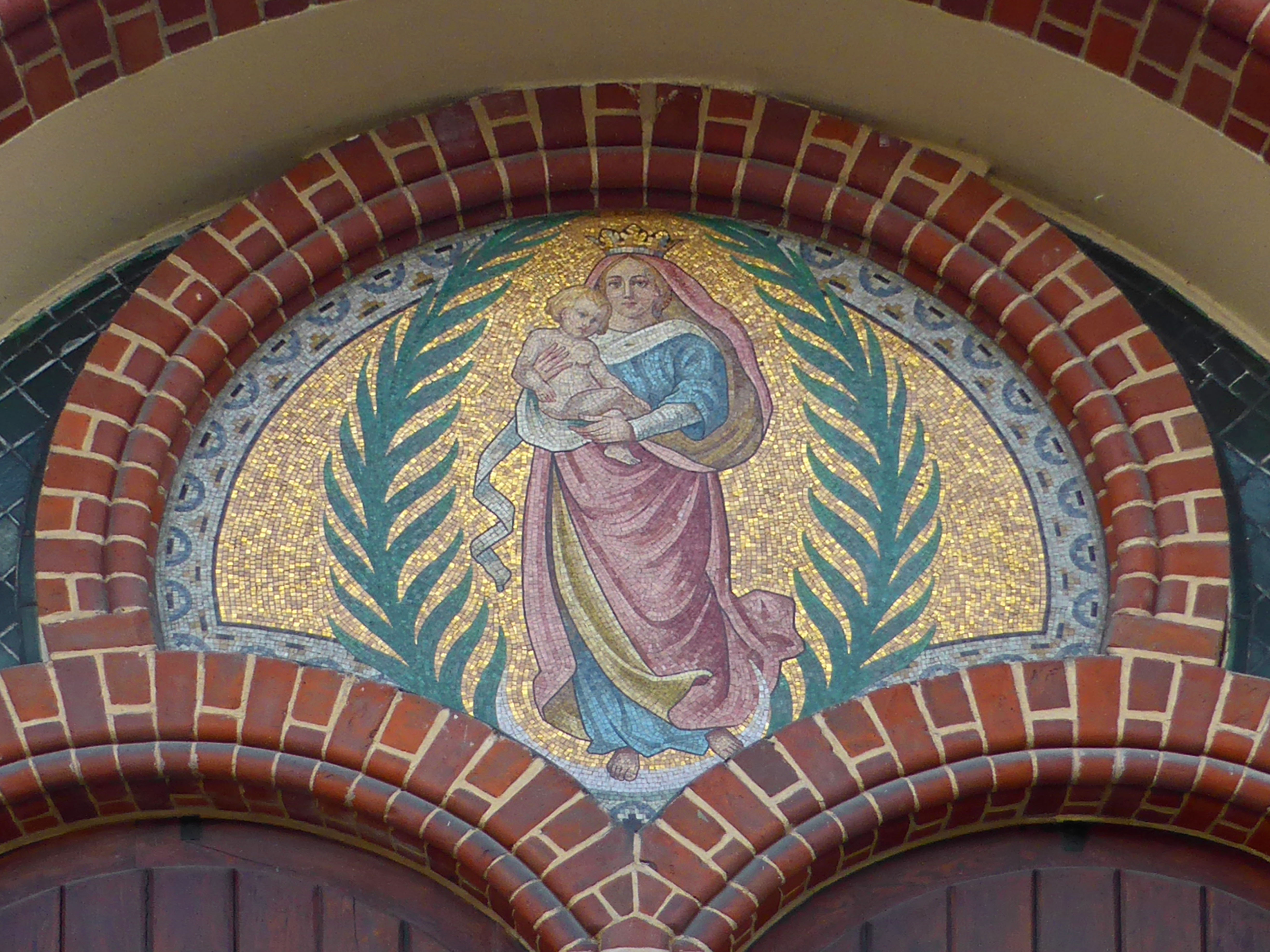 Katholische Kirche Maria Rosenkranzkönigin in Genthin. Über dem Eingang ist als Mosaik zwischen Palmenblättern eine Mondsichelmadonna, ähnlich dem Genthiner Stadtwappen, abgebildet.